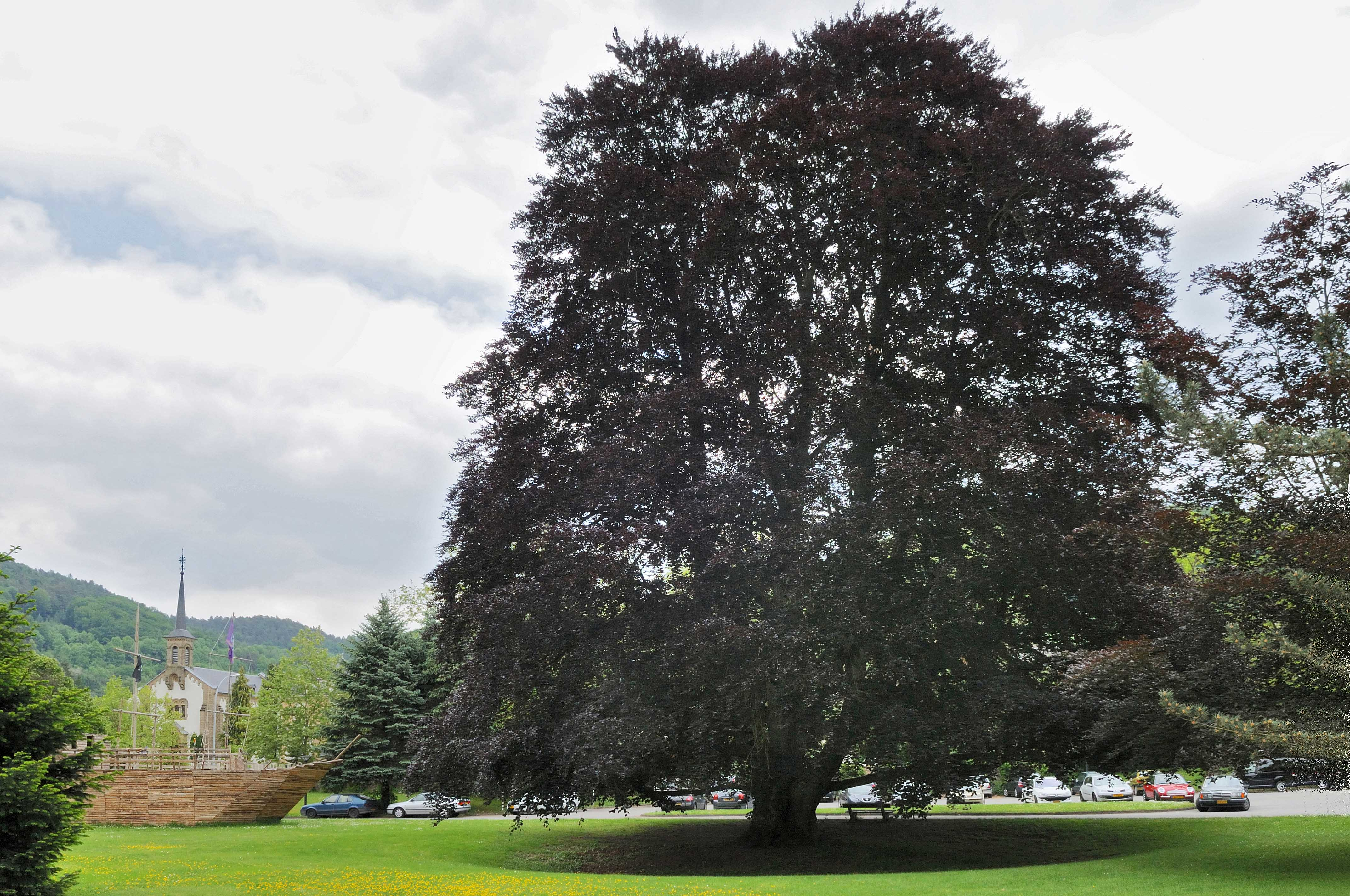 D'Bluttbuch am Gréijoer.